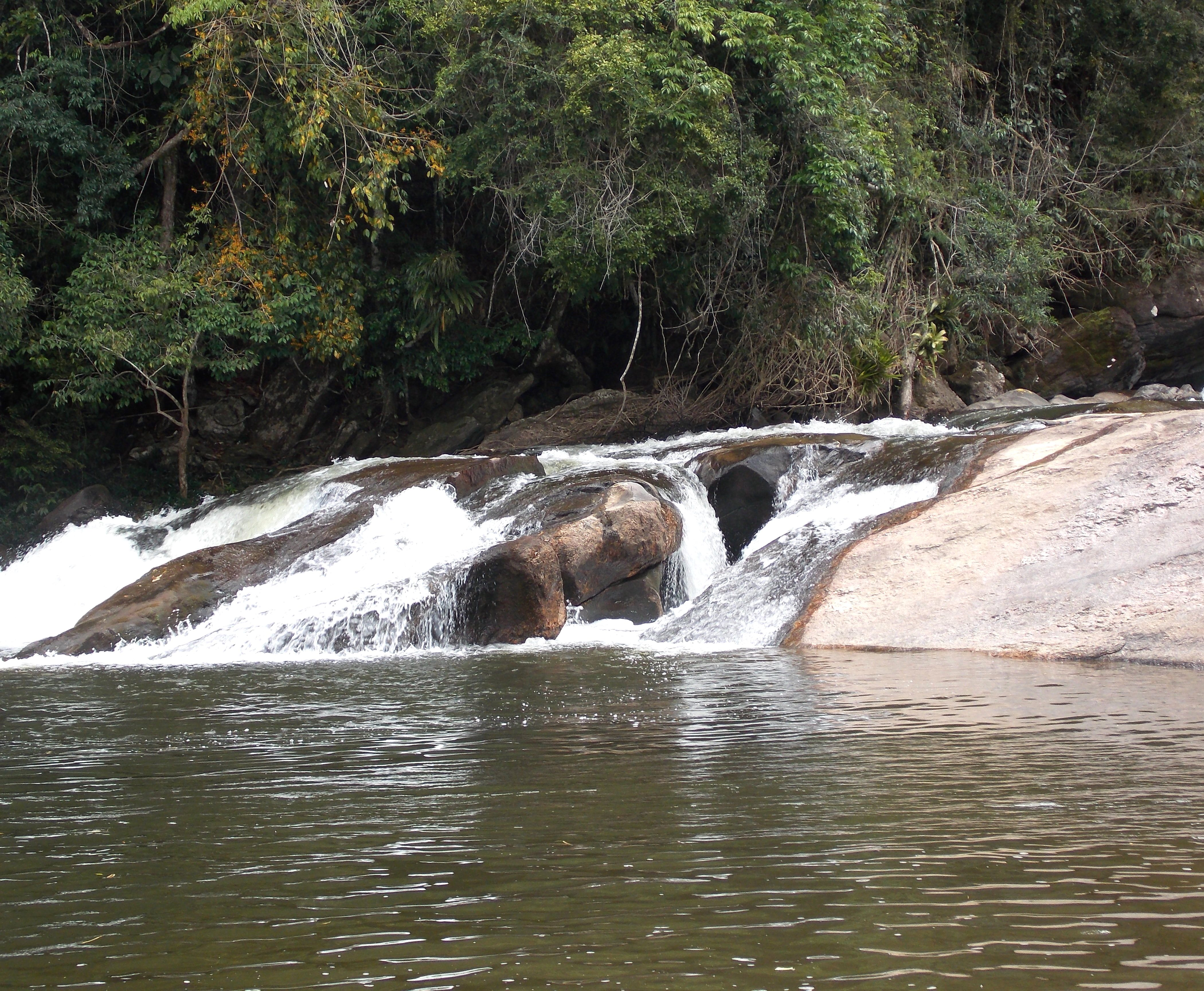 Belíssima cachoeira de Lumiar